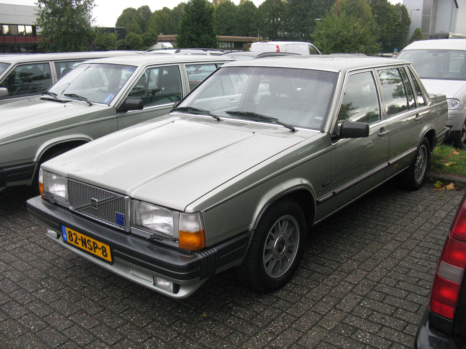 Volvo Klassiekers Beurs, Utrecht